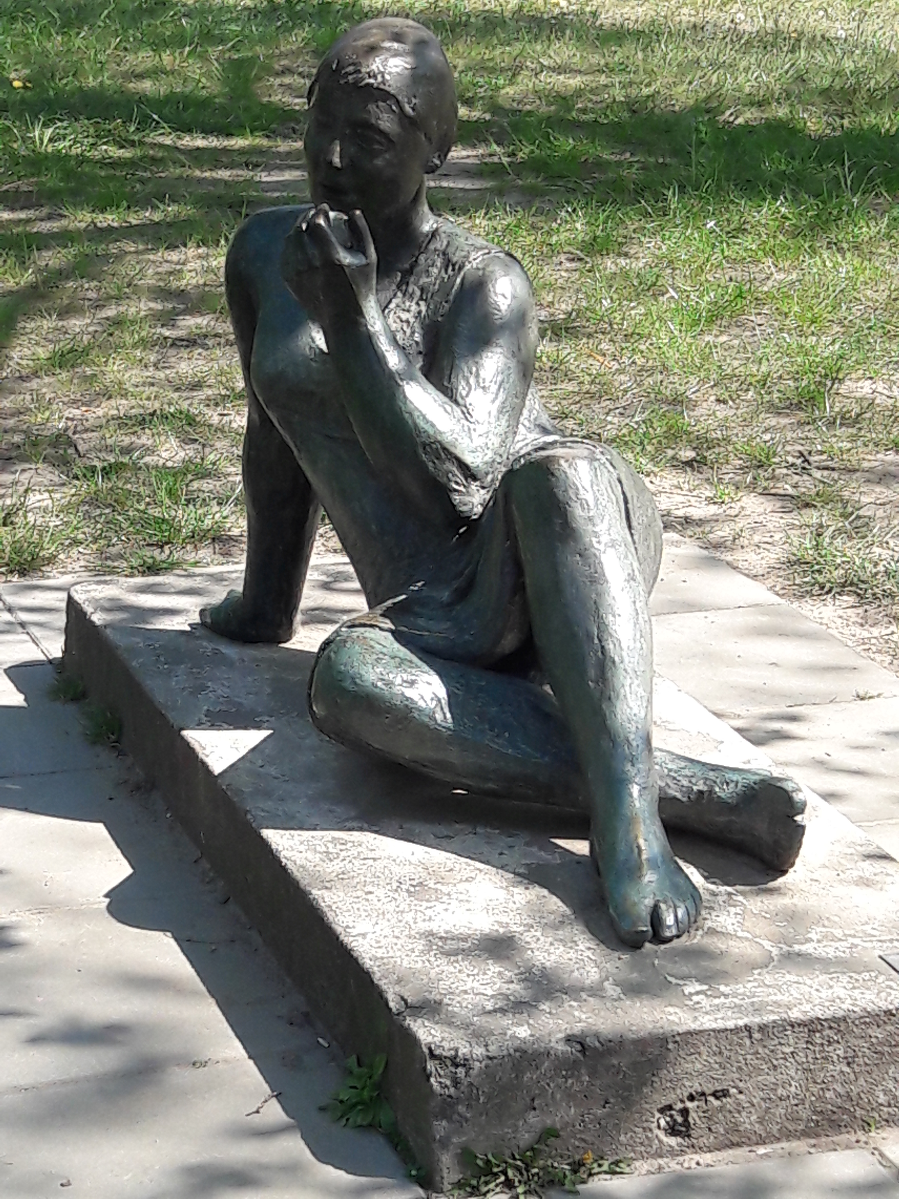 Mädchen mit Apfel, Zweitguss im Nibelungenpark, Berlin-Lichtenberg. Künstlerin: Christa Sammler